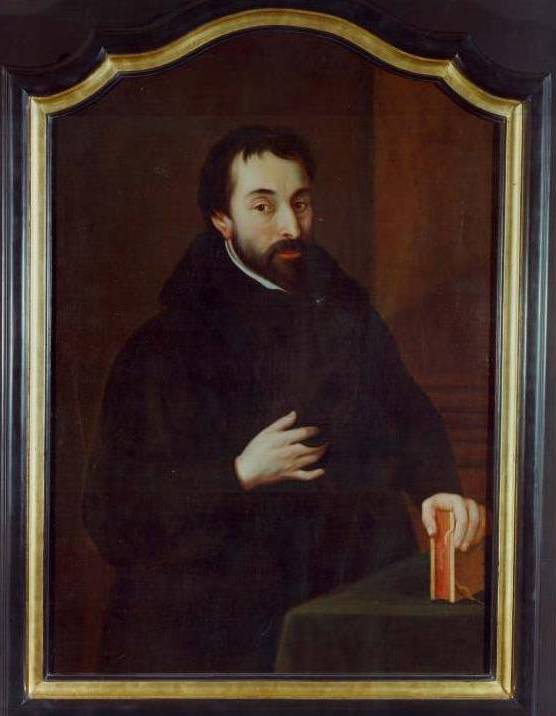 Friedrich Spee. Ölbild. nach 1634; Kölner Gymnasial- und Stiftungsfonds. Foto durch Stadtarchiv und Stadtbibl. Trier